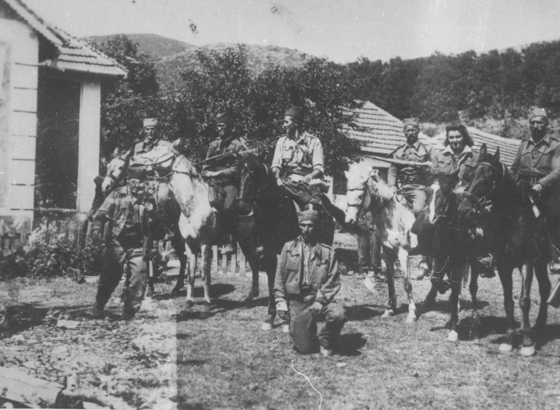 Srpskohrvatski / српскохрватски: Članovi Glavnog štaba Srbije sa četničkim majorom Radoslavom Đurićem, koji je prešao partizanima 1944.